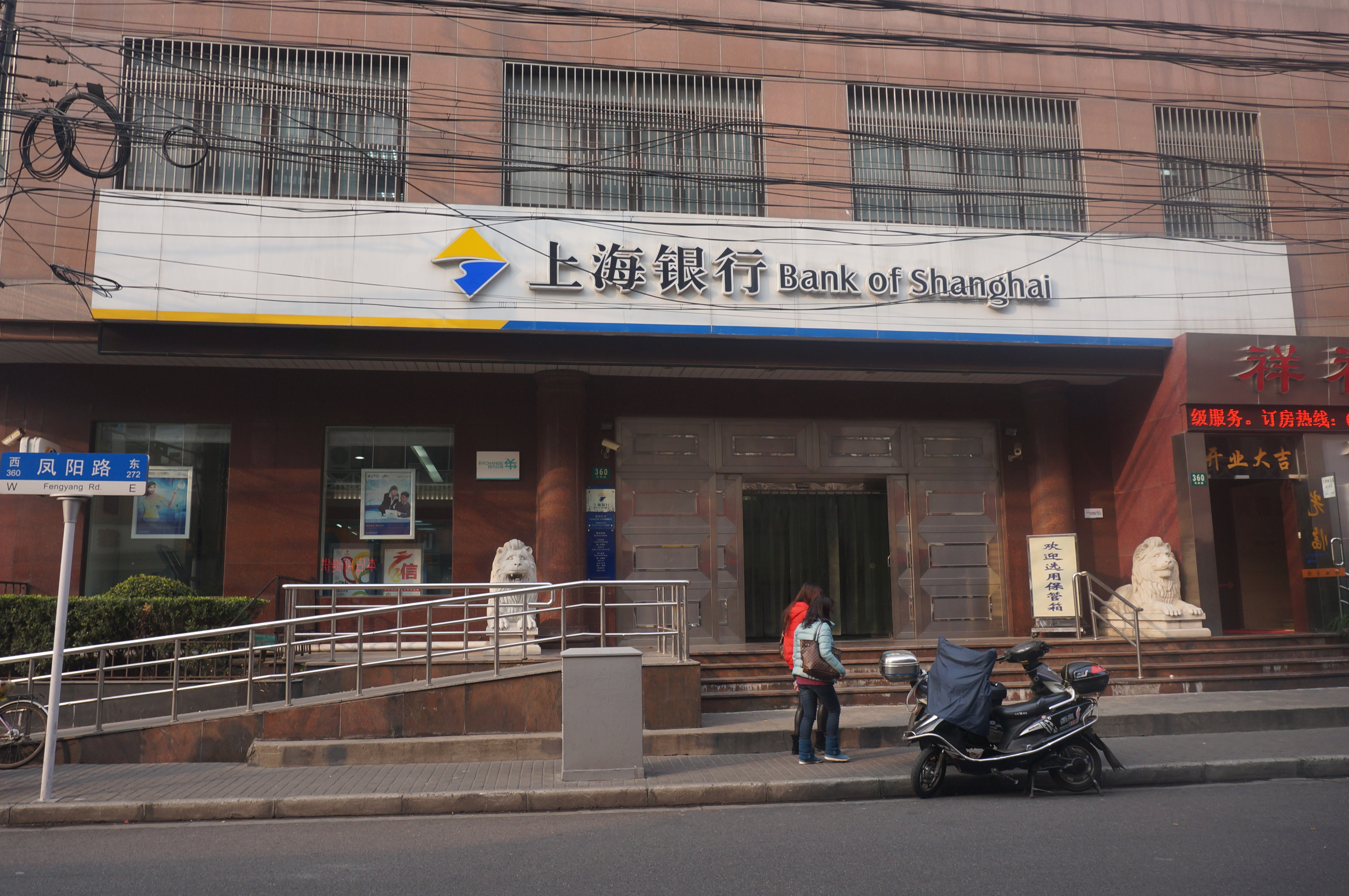 中文（中国大陆）: 上海银行一家支行